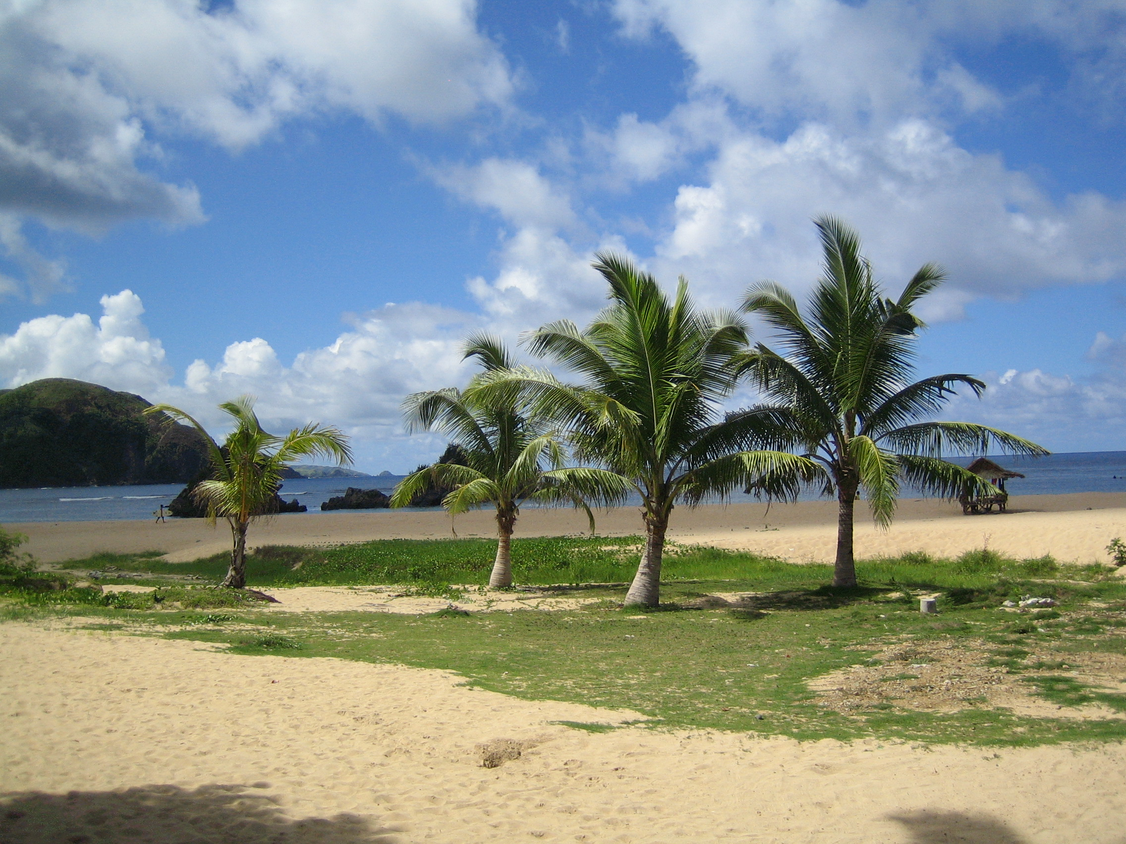 Puraran beach, Baras, Catanduanes, Philippines